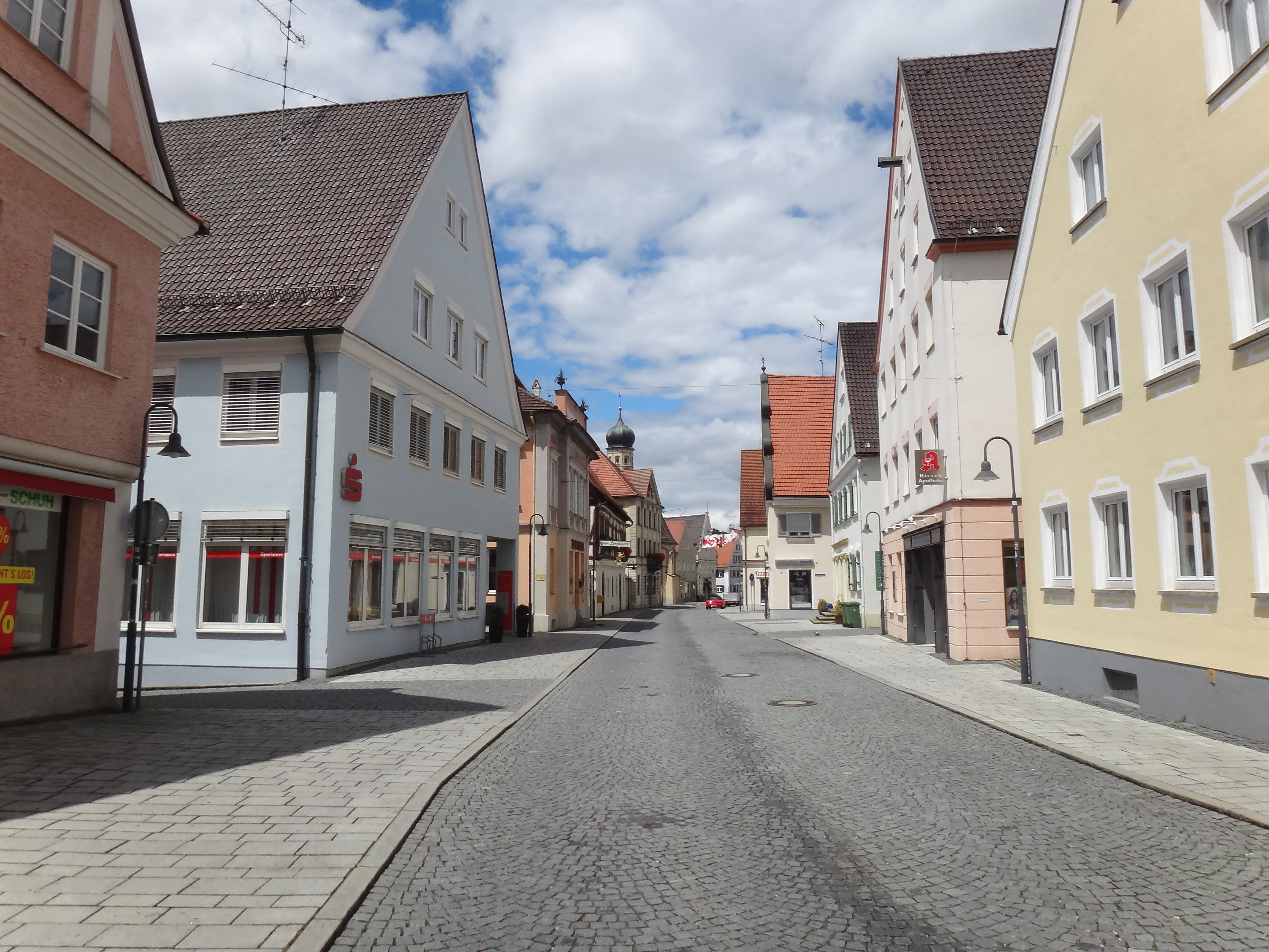 Weißenhorn Hauptstrasse 15.07.2012